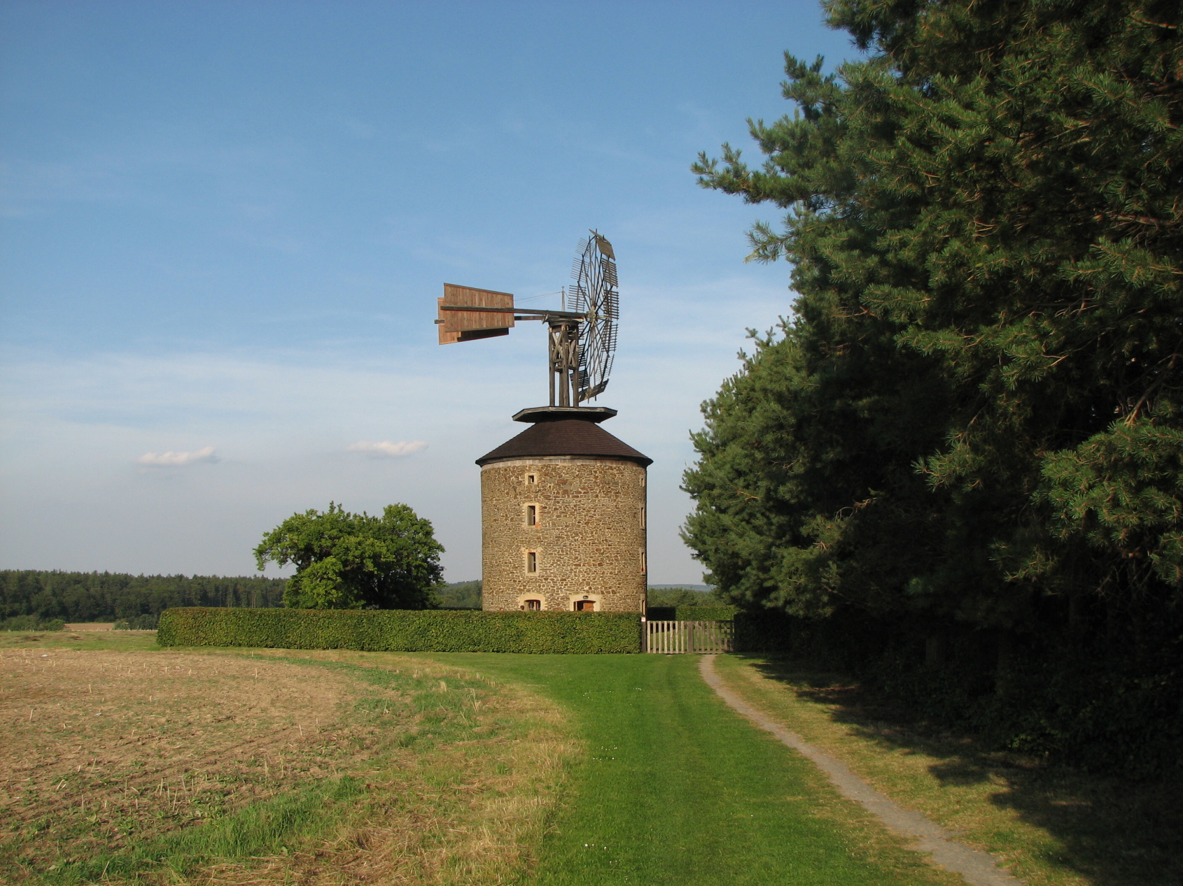 Větrný mlýn (Ruprechtov), Ruprechtov 213